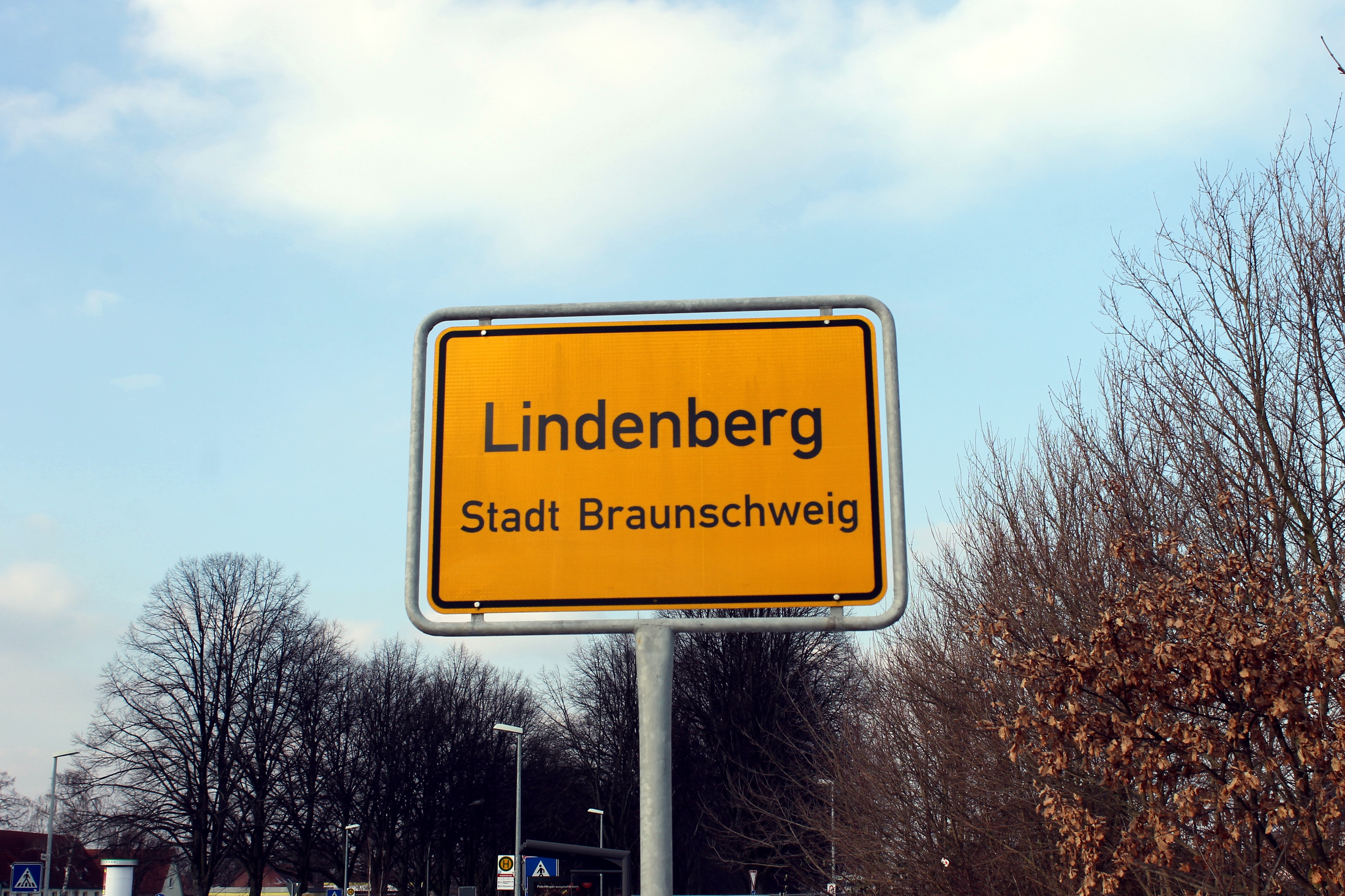 Ortstafel des Stadtteils Lindenberg in Braunschweig